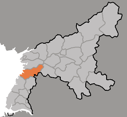 Map of Pyongwon, Pyongan-namdo, DPRK, 2006